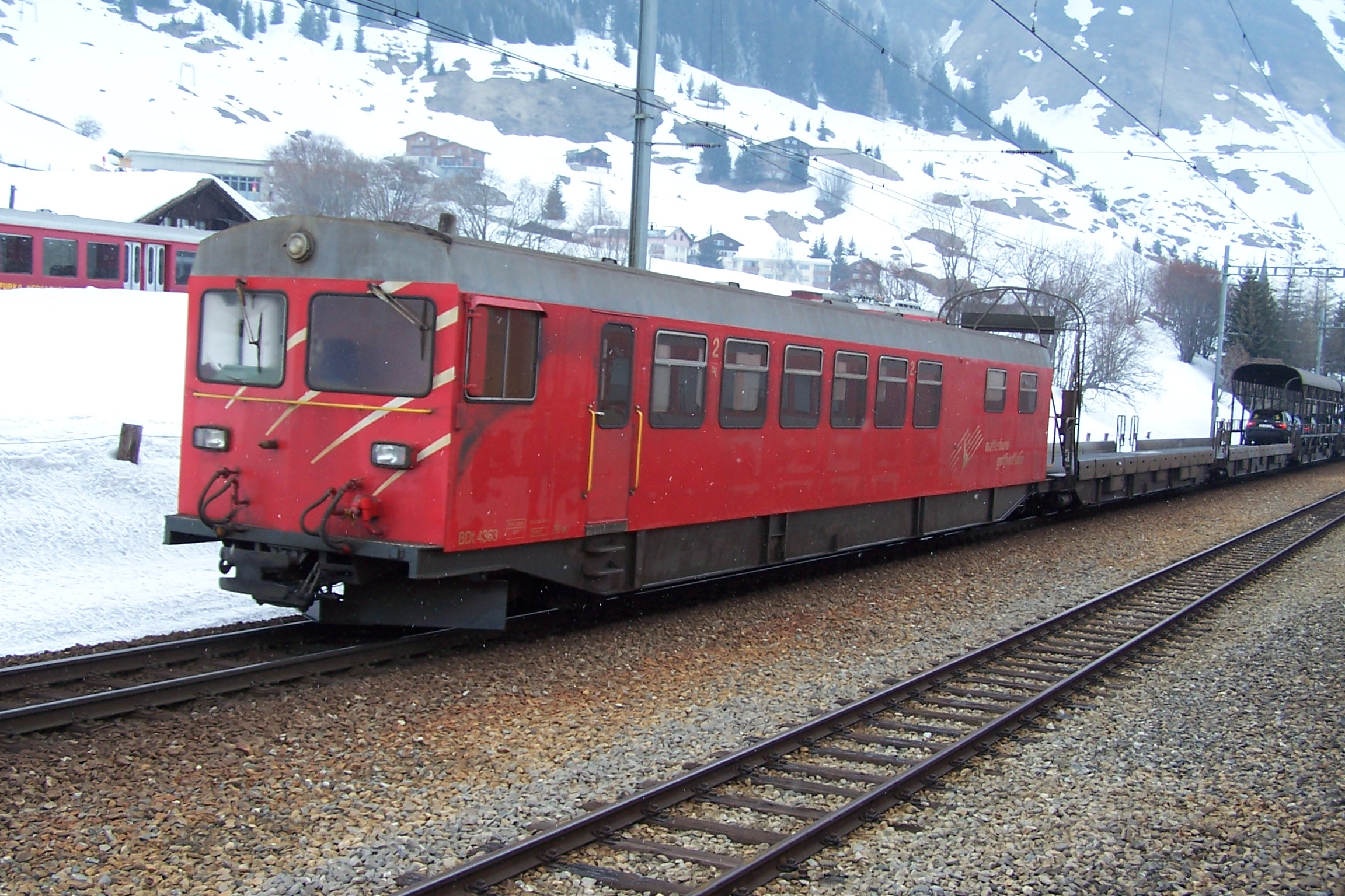 Steuerwagen des Autozuges Oberwald–Realp